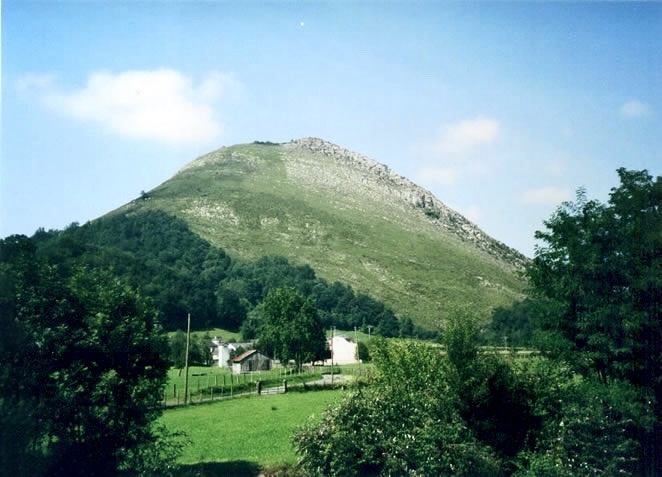 Chapeau de gendarme à Atherey Pyrénées).